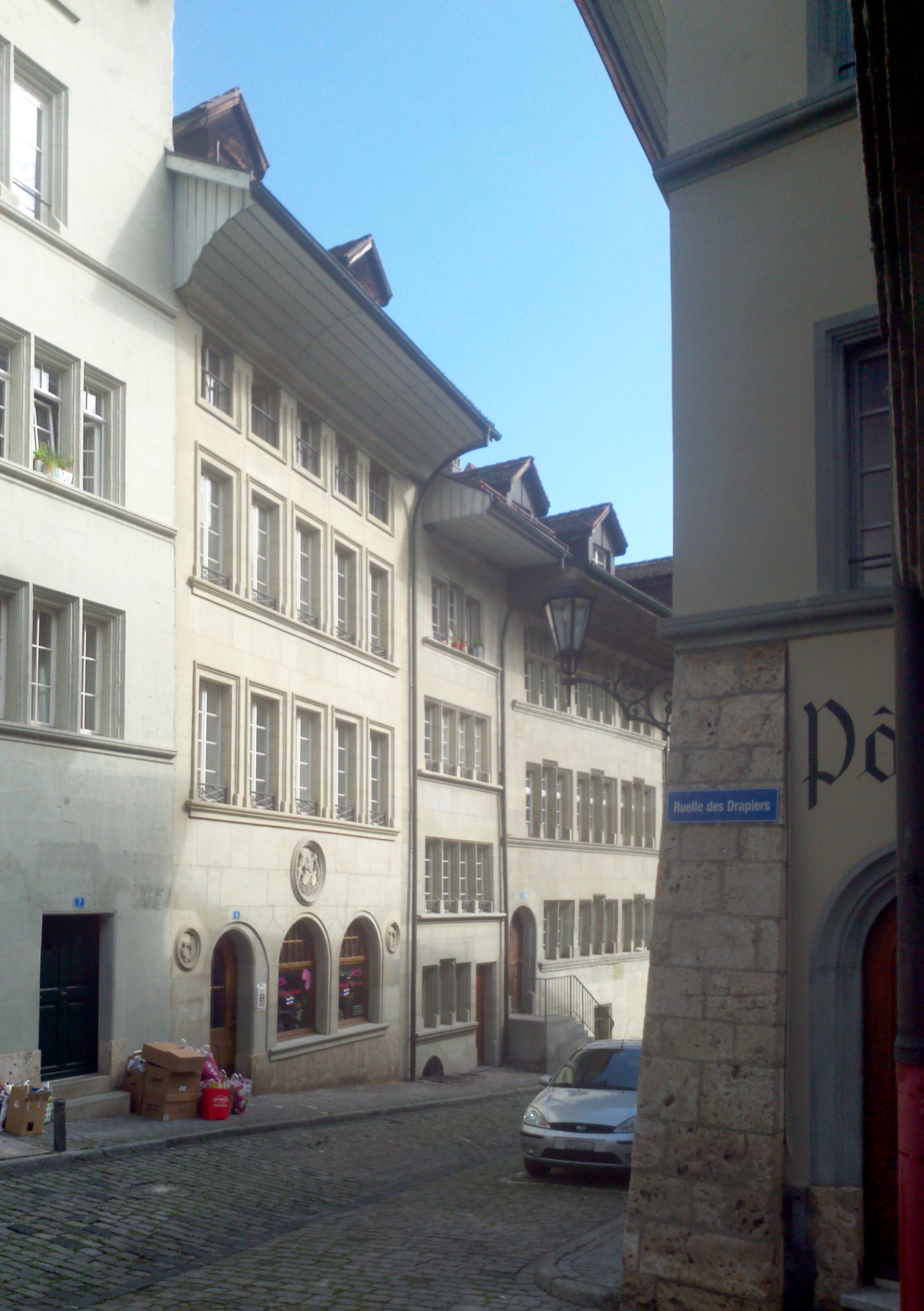 Rue d'Or 9, Fribourg